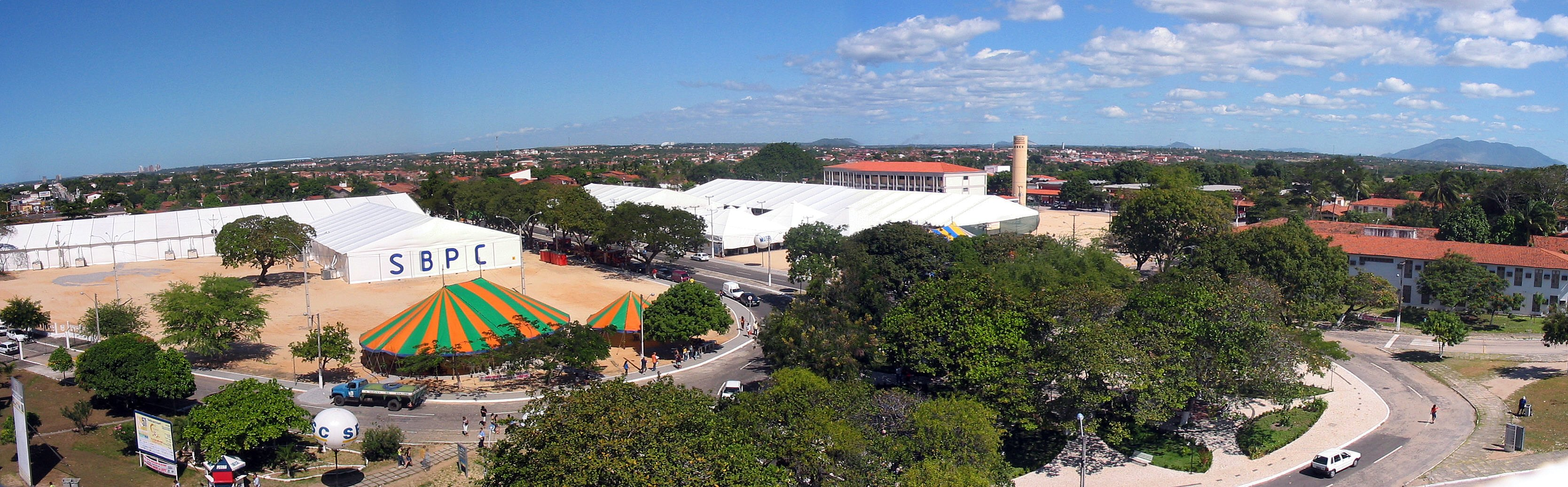 Foto panorâmica da UECE durante a realização da reunião anual da sbpc em 2005